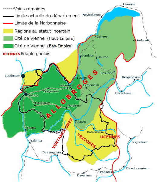 Carte de la Cité de Vienne, au Bas et au Haut-Empire, avec le nom des peuple gaulois et les régions au statut incertain (d'après le Atlas du patrimoine de l’Isère, p.41 et "Vienna, Vienne, p.27)